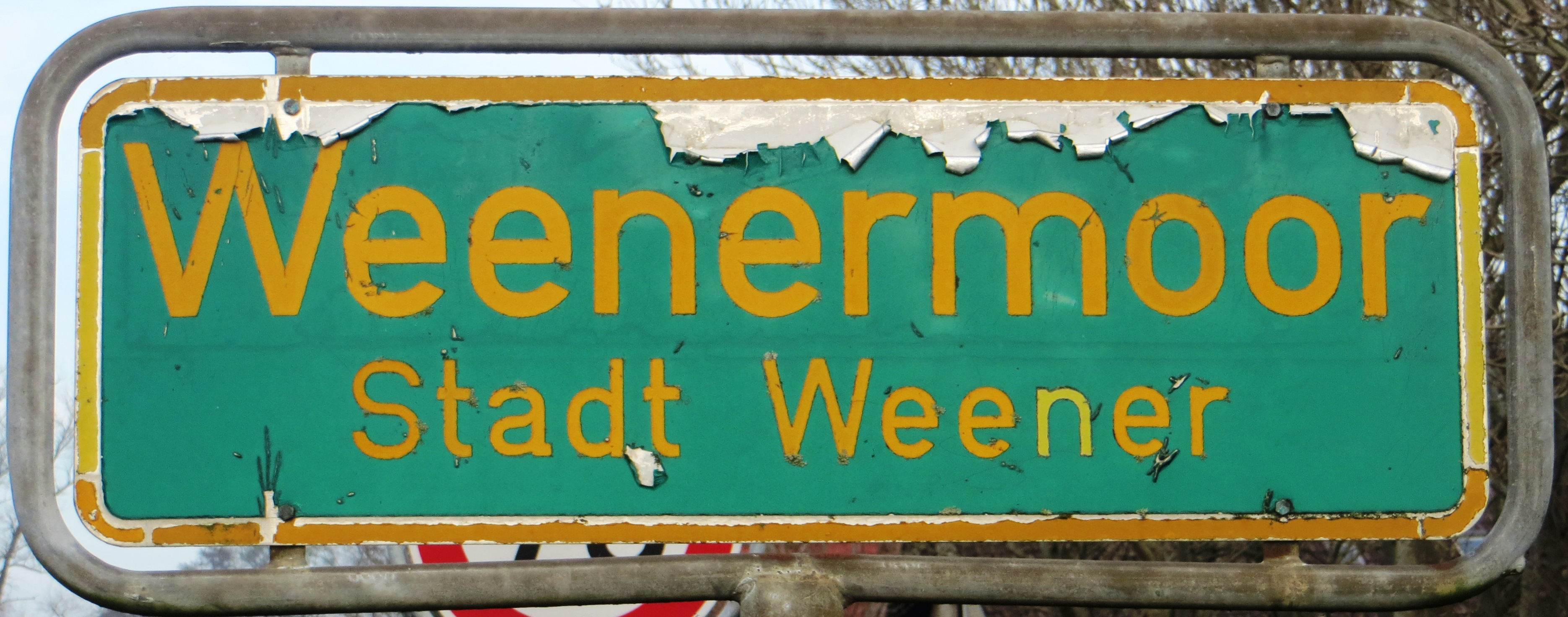 plaatsnaambord Weenermoor